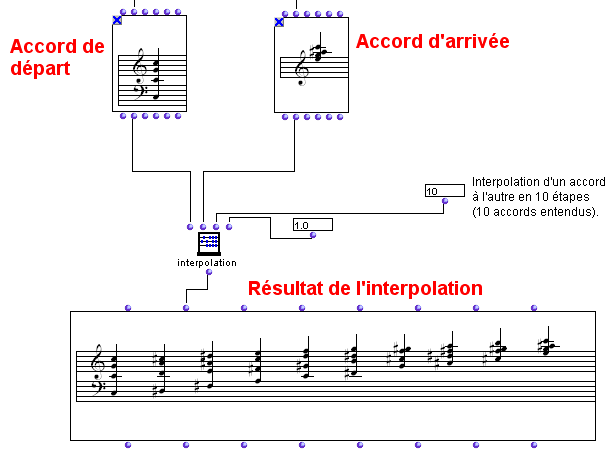 Schéma d'une interpolation d'accords, réalisé avec le logiciel Openmusic.